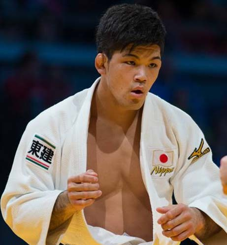 柔道グランプリデュッセルドルフ2016 photo by C.Fidler